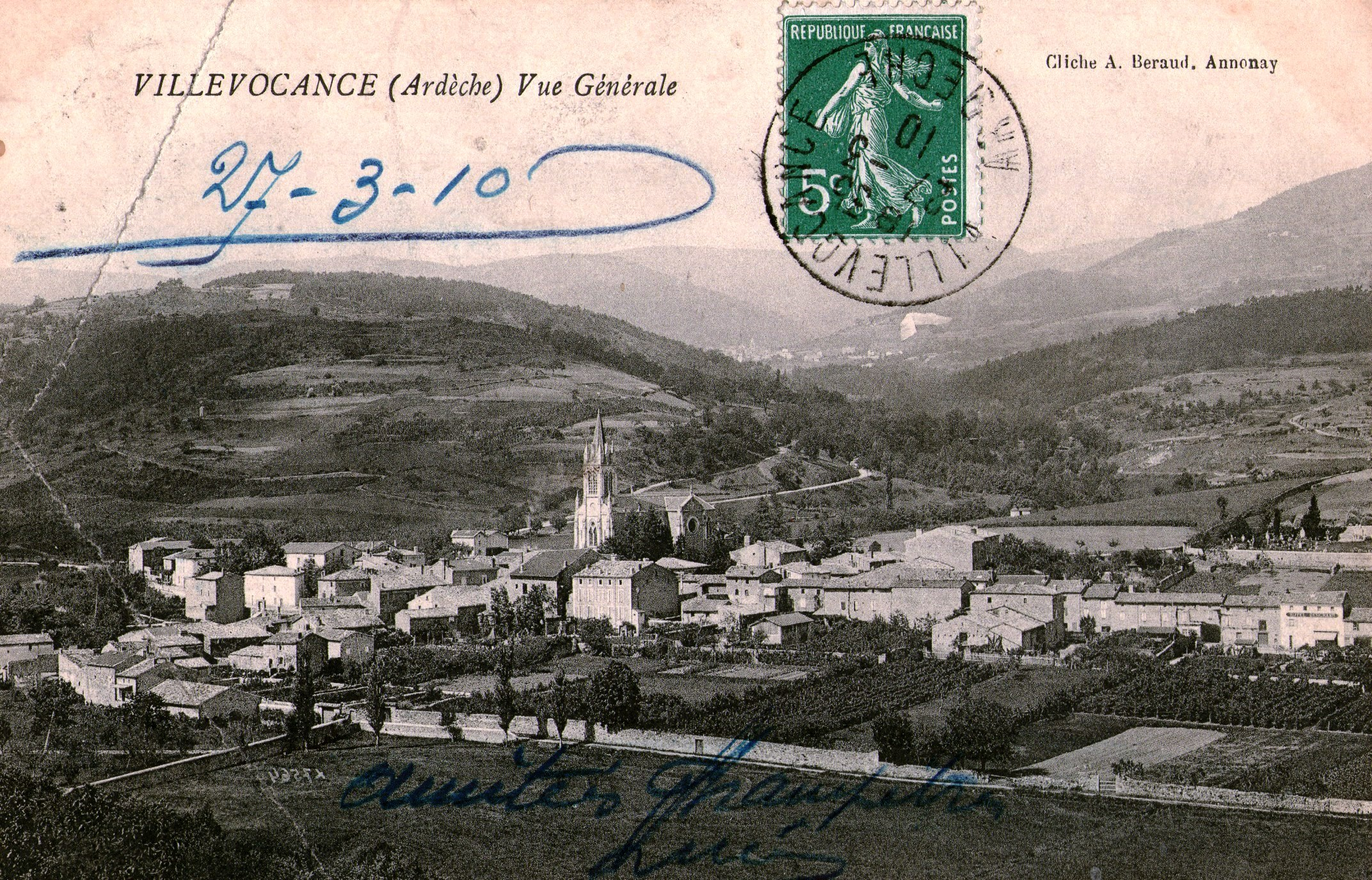 Villevocance vue générale